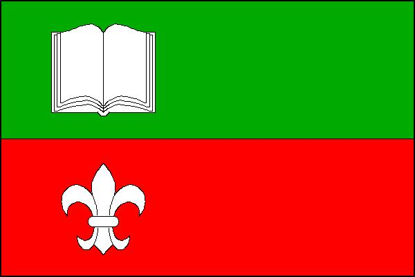 Vlajka obce Blažovice